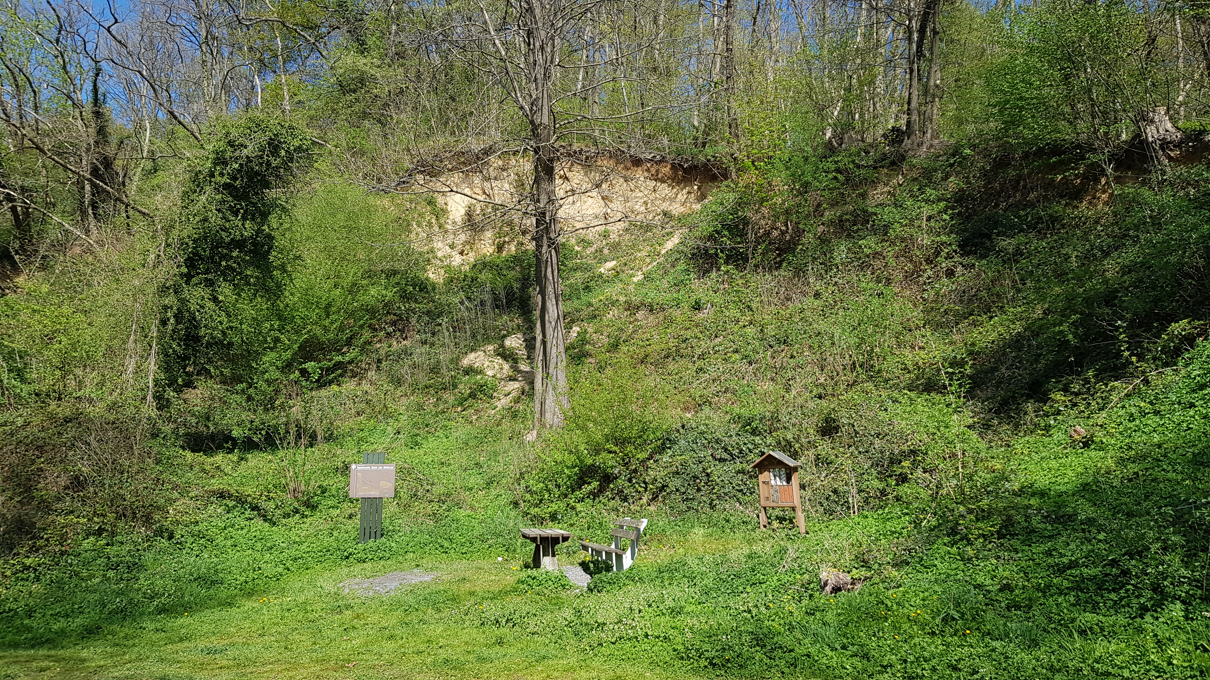 Groeve Waterval, Meerssen, Nederland